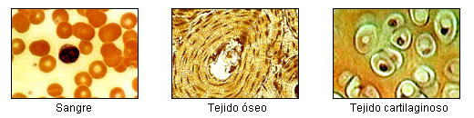 Algunos tejidos conjuntivos (2/2)